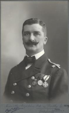 Miklós Horthy con uniforme de teniente de navío, alrededor de 1909